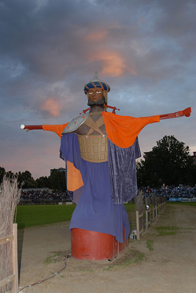 Palio del Niballo-Faenza-Italie